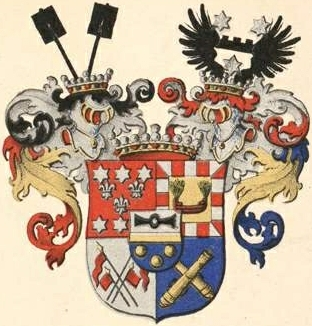 Clodt von Jürgensburgi suguvõsa vabahärravapp